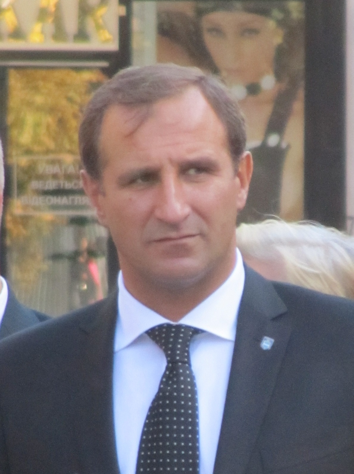 Олег Бабаєв на Дні міста біля реконструйованого фонтану 25 жовтня